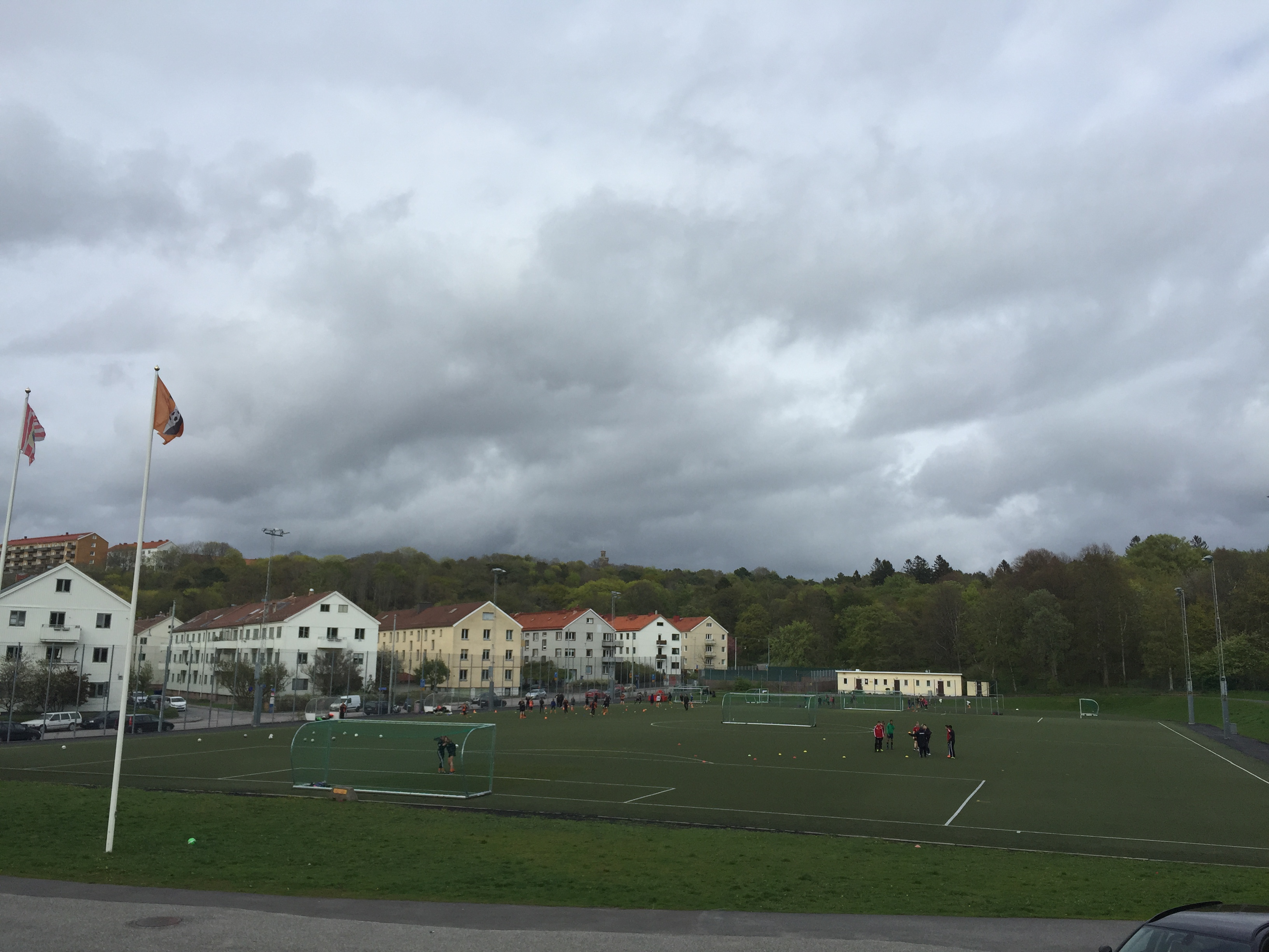 Vy över Majvallen, Göteborg